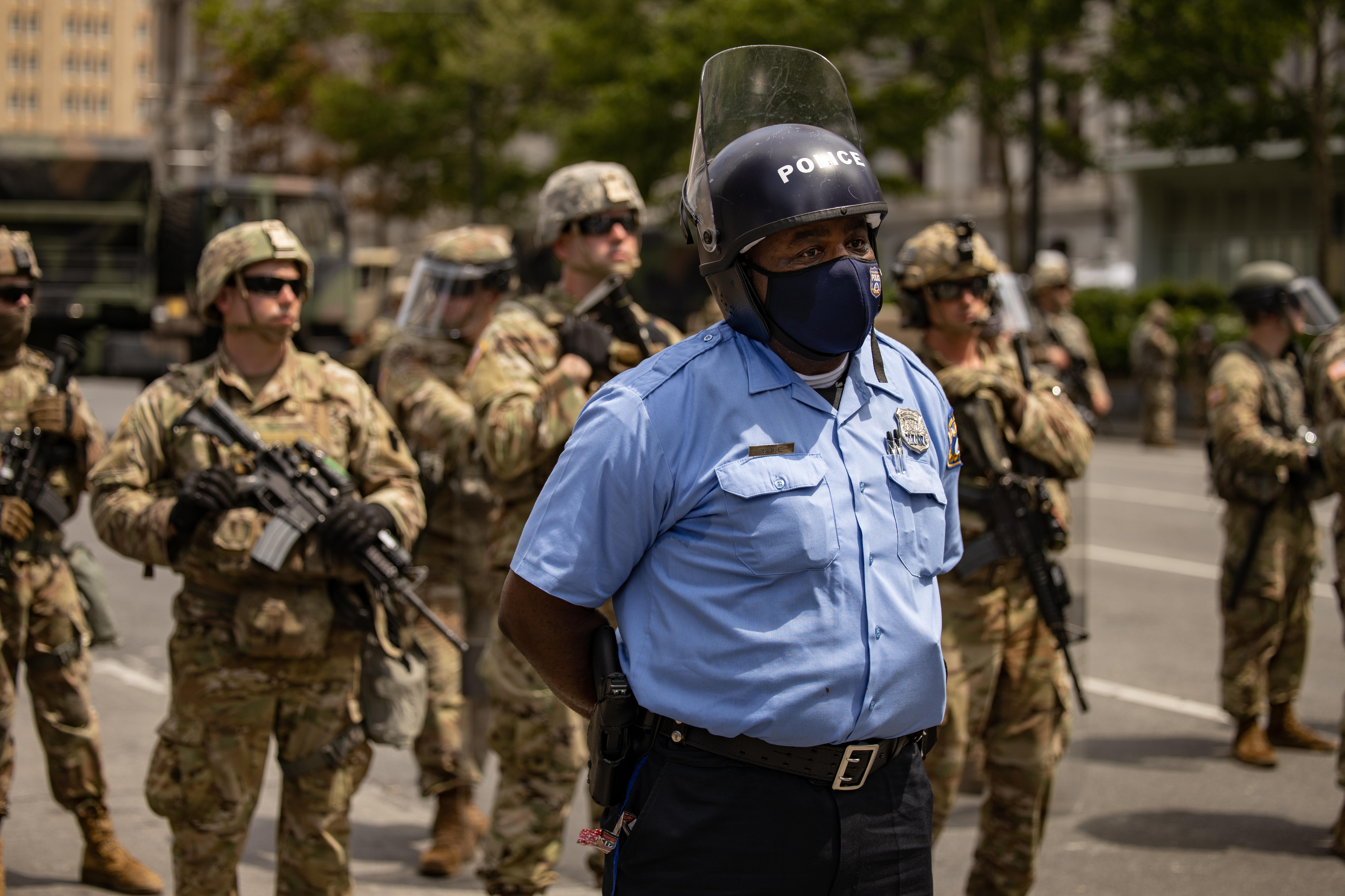 George Floyd protests in Philadelphia